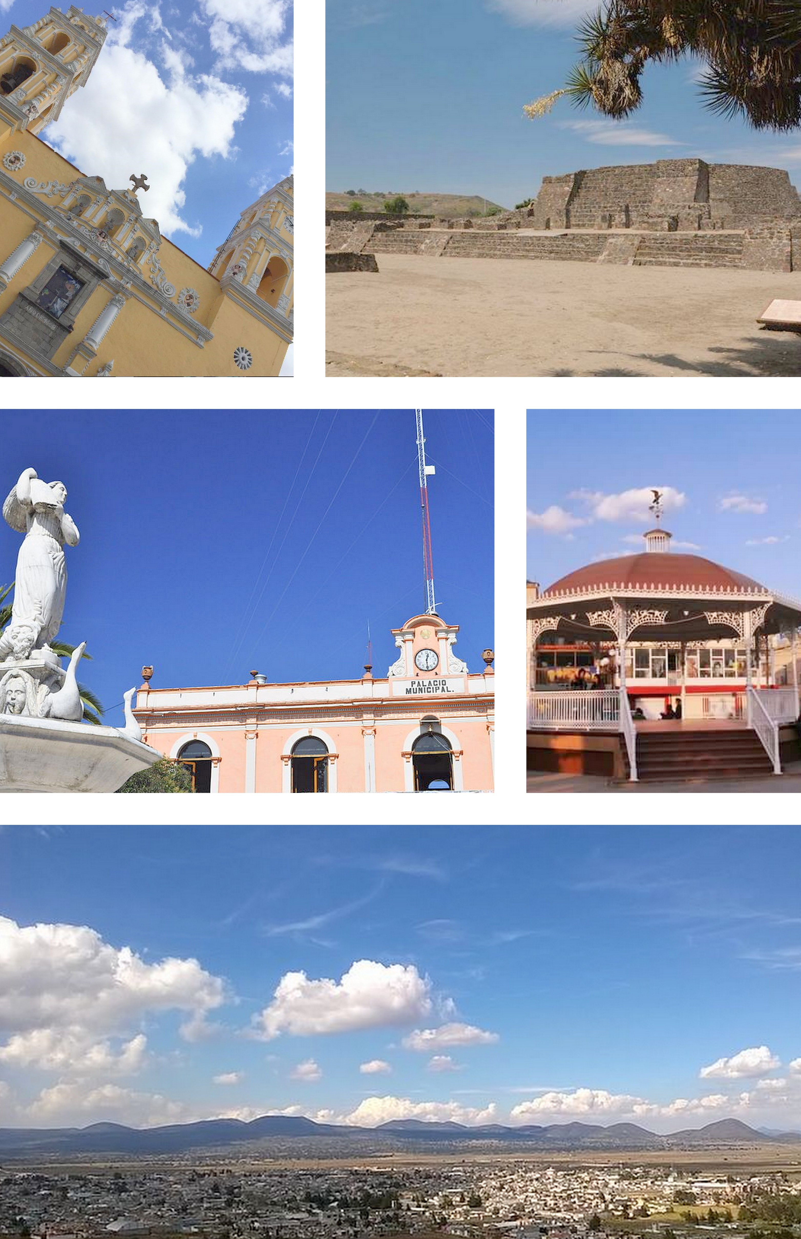 Montaje creado a partir de cinco imágenes en Wikimedia Commons: File:Tecoaque, Tlaxcala 03.jpg File:Presidencia Municipal2.JPG File:Parroquia de San Antonio, Calpulalpan.jpg File:Air view of Calpulalpan, Tlaxcala.jpg File:Calpulalpan centro.jpg